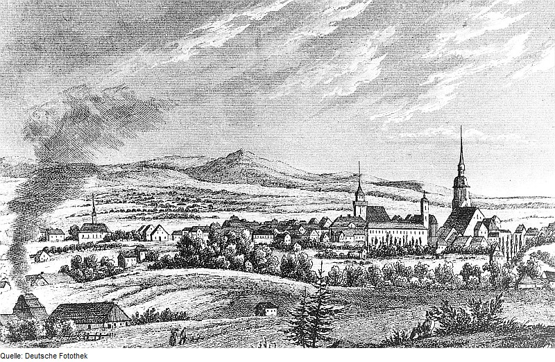 Original image description from the Deutsche Fotothek Löbau. Ortsansicht, aus: Schiffner 1840